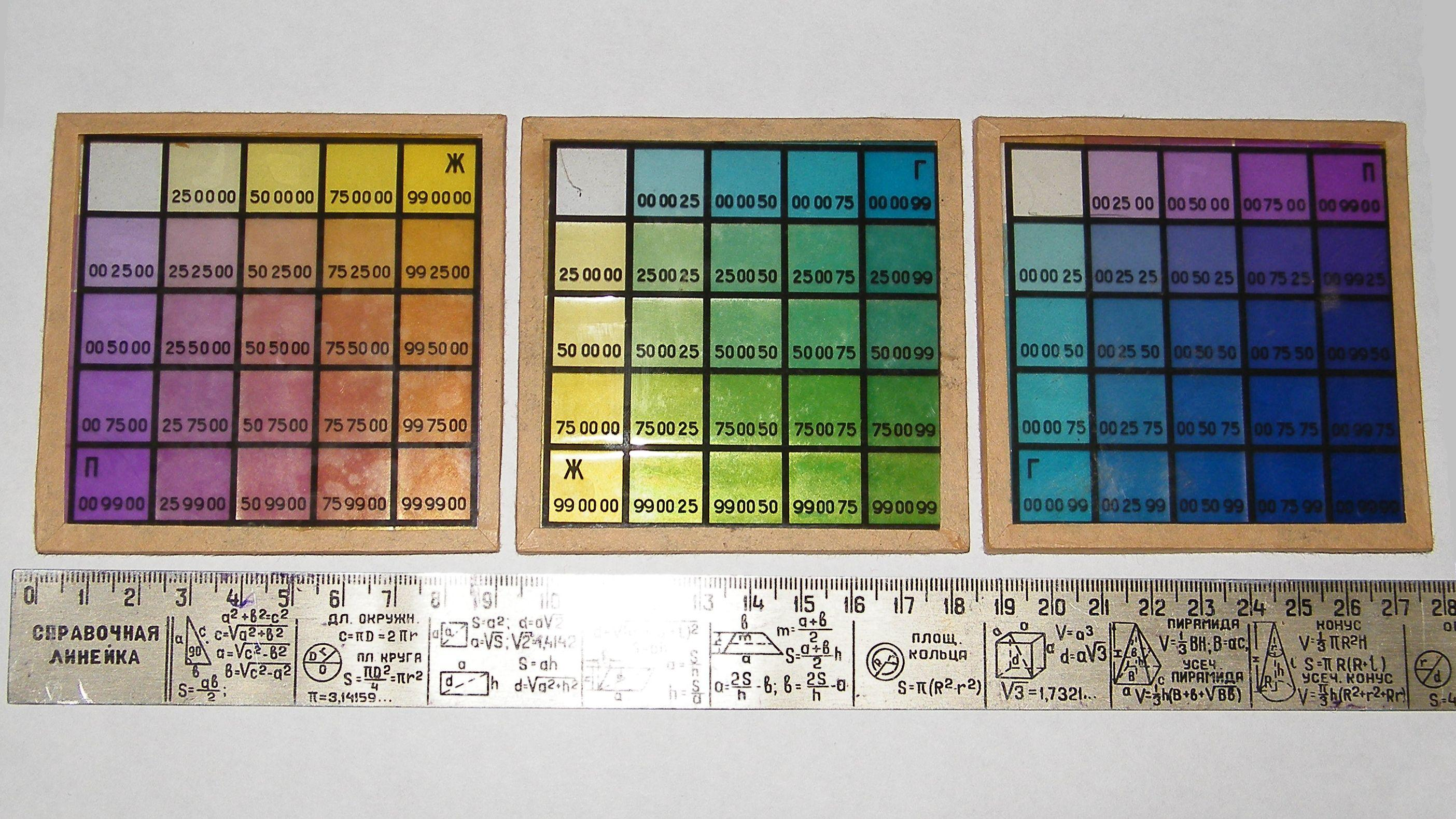 Мозаичные светофильтры для цветной фотопечати. 1982 год.